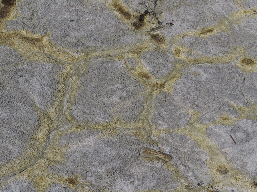 Kieselgurschicht im Naturschutzgebiet Soos in der tschechischen Republik